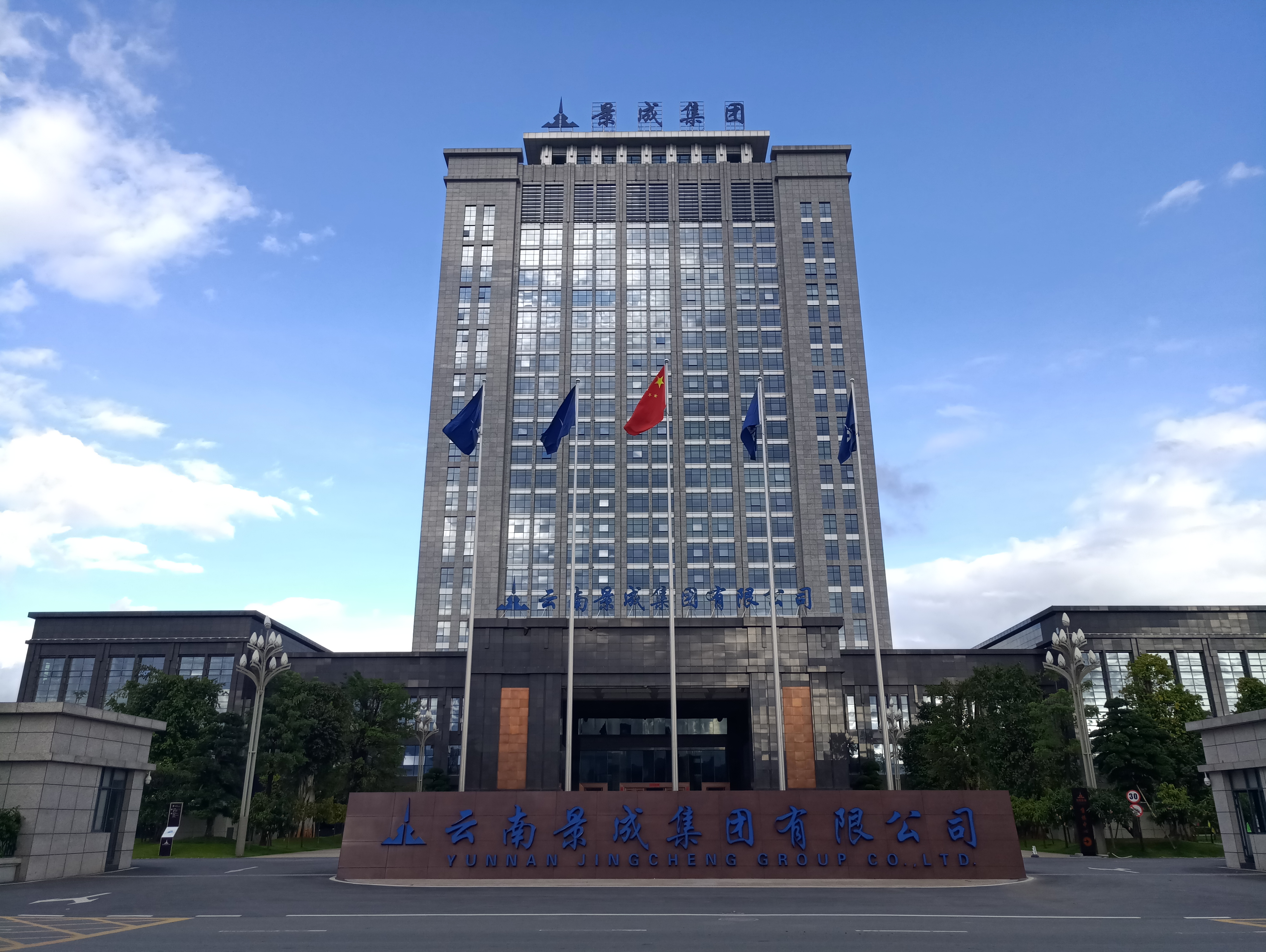 中文（中国大陆）: 景成集团总部